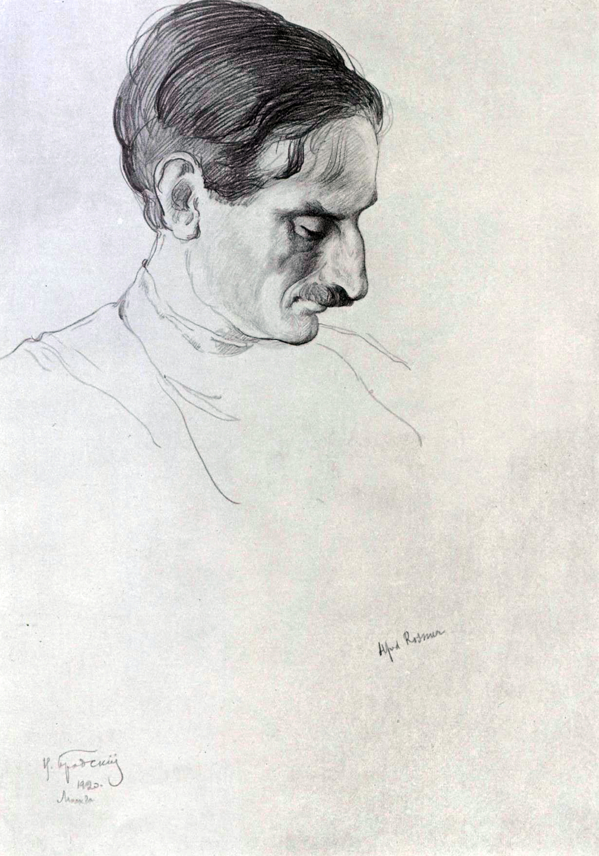 Росмер, Альфред